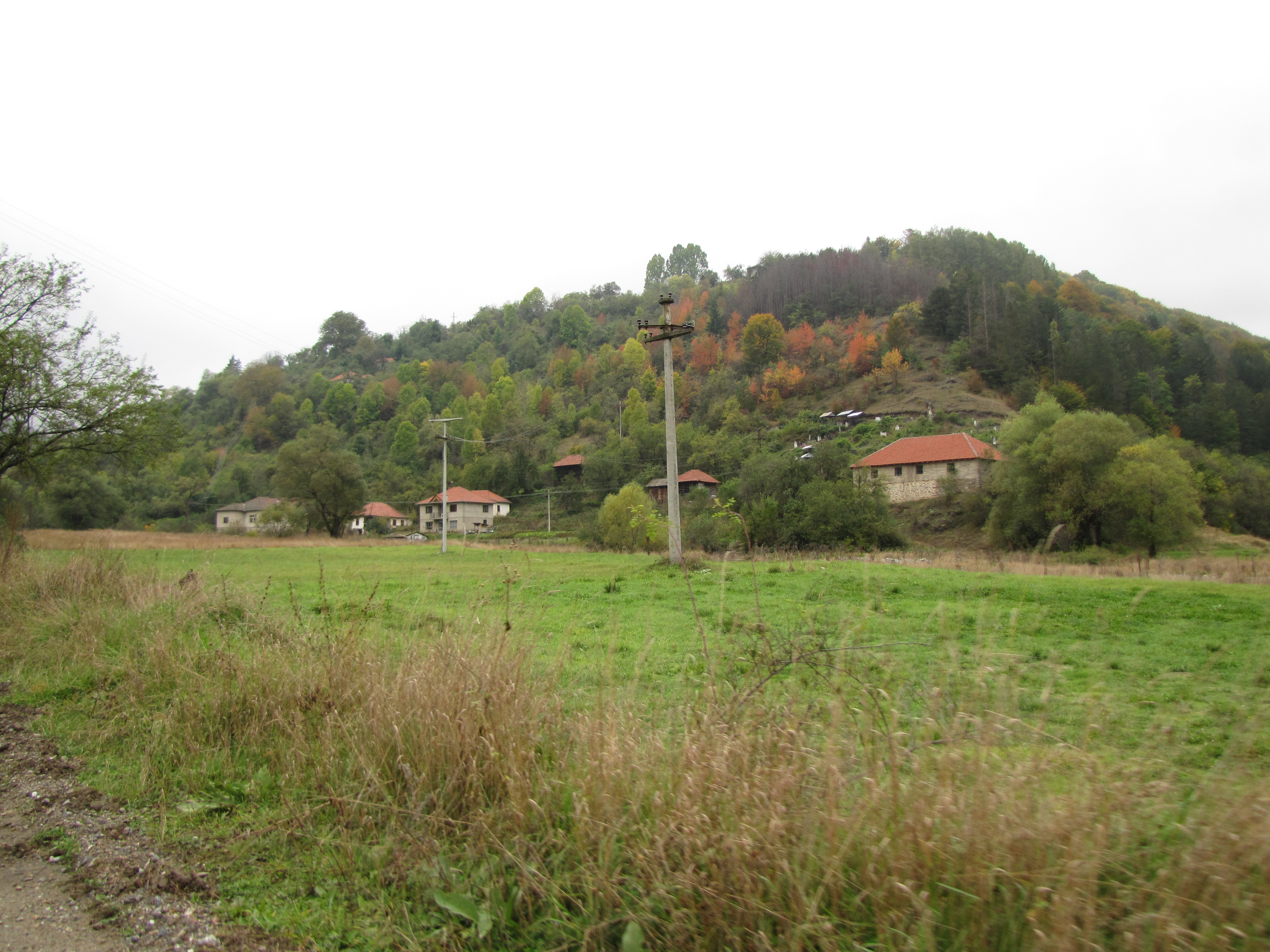 Село Мусуљ (Босилеград).